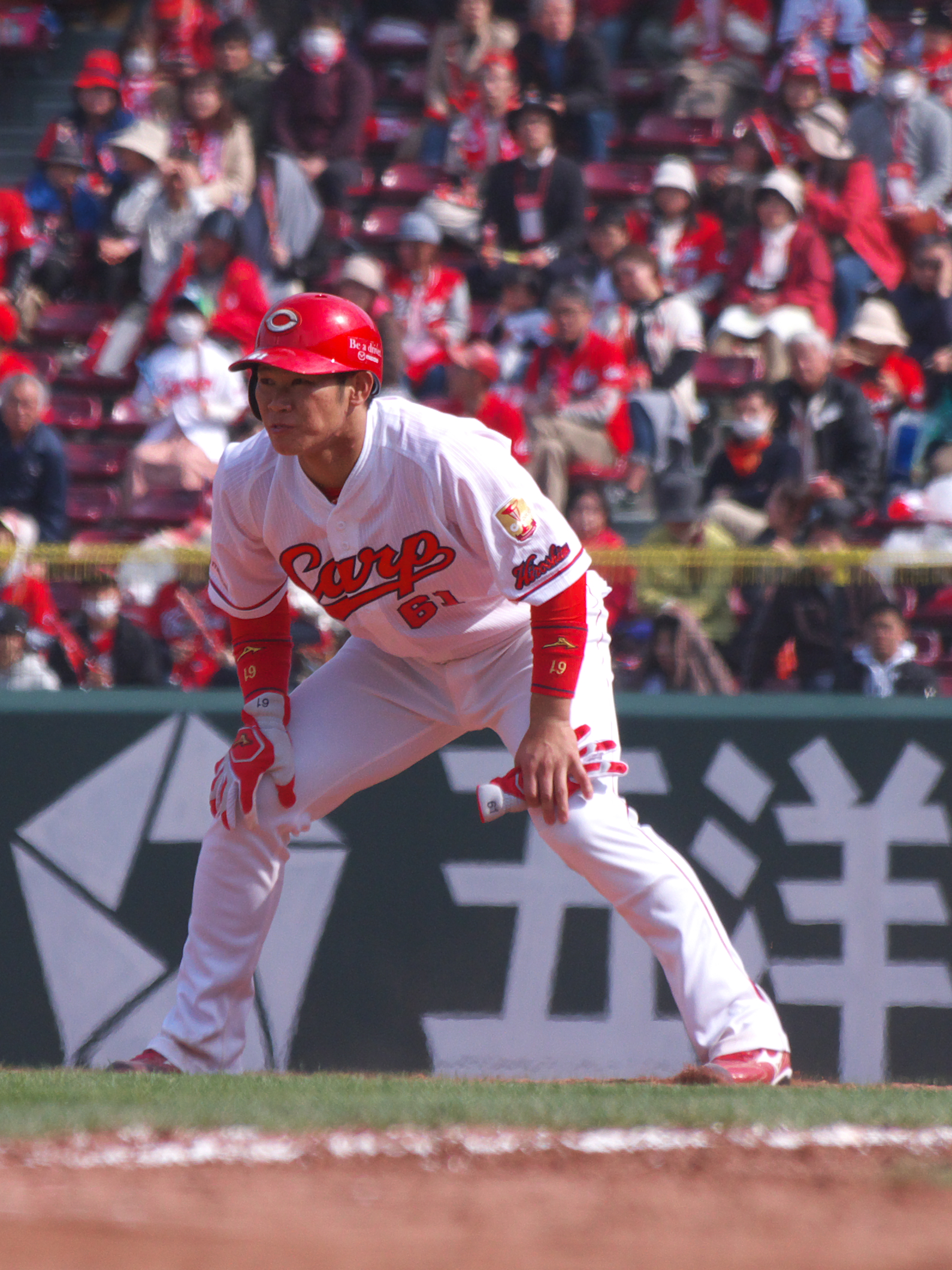 広島東洋カープ坂倉将吾